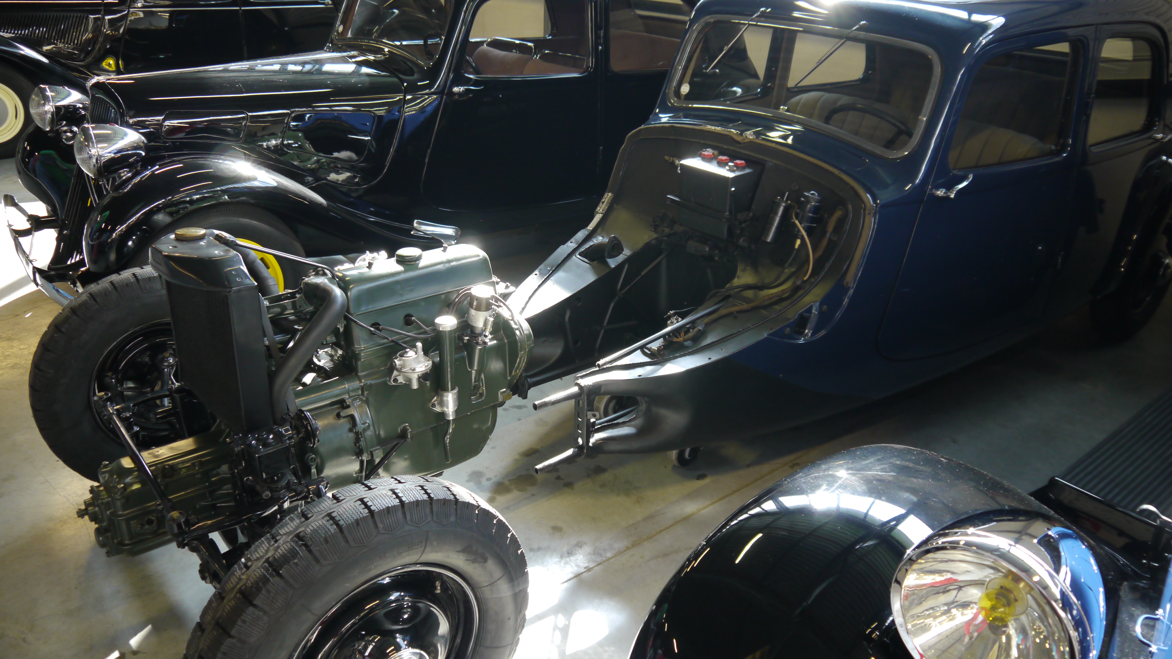 Conservatoire Citroen 063